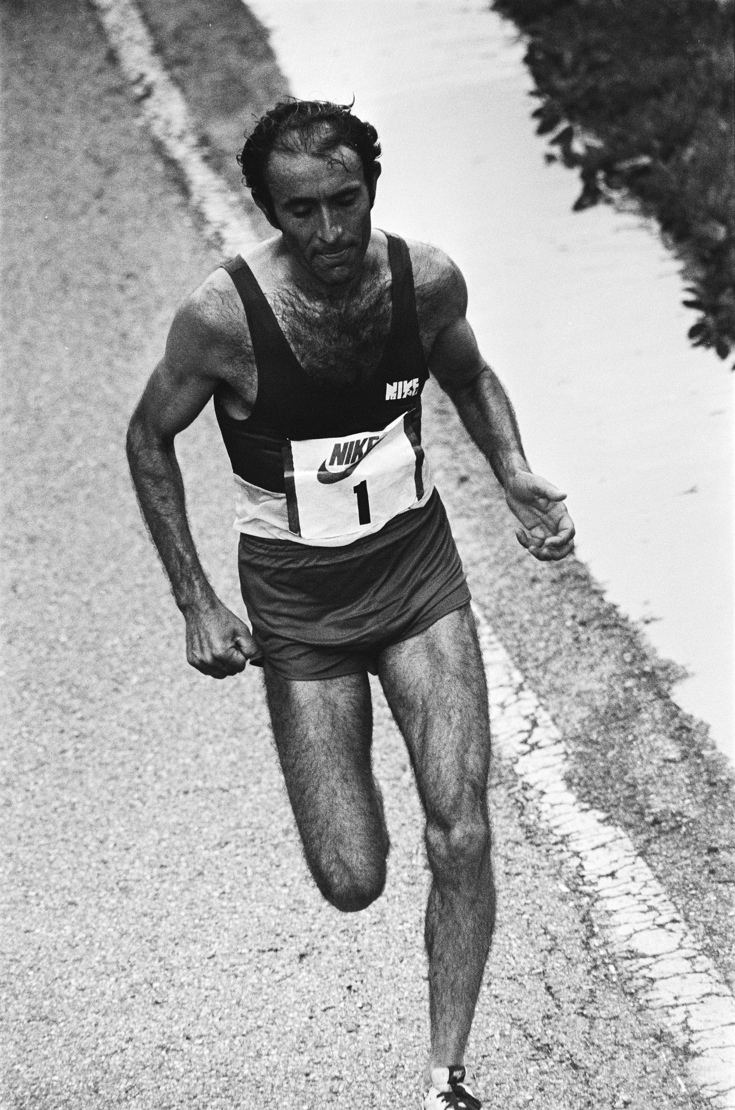 Collectie / Archief : Fotocollectie Anefo Reportage / Serie : [ onbekend ] Beschrijving : Tweede Rotterdam marathon; winnaar Rodolfo Gomez (Mexico) in aktie Datum : 22 mei 1982 Locatie : Rotterdam, Zuid-Holland Trefwoorden : atletiek, marathons, sport Persoonsnaam : Gomez Rodolfo Fotograaf : Dijk, Hans van / Anefo Auteursrechthebbende : Nationaal Archief Materiaalsoort : Negatief (zwart/wit) Nummer archiefinventaris : bekijk toegang 2.24.01.05 Bestanddeelnummer : 932-1752